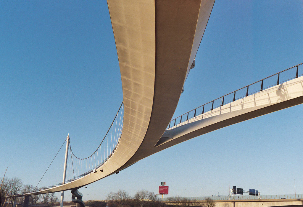 De Nesciobrug tussen Amsterdam en Diemen.